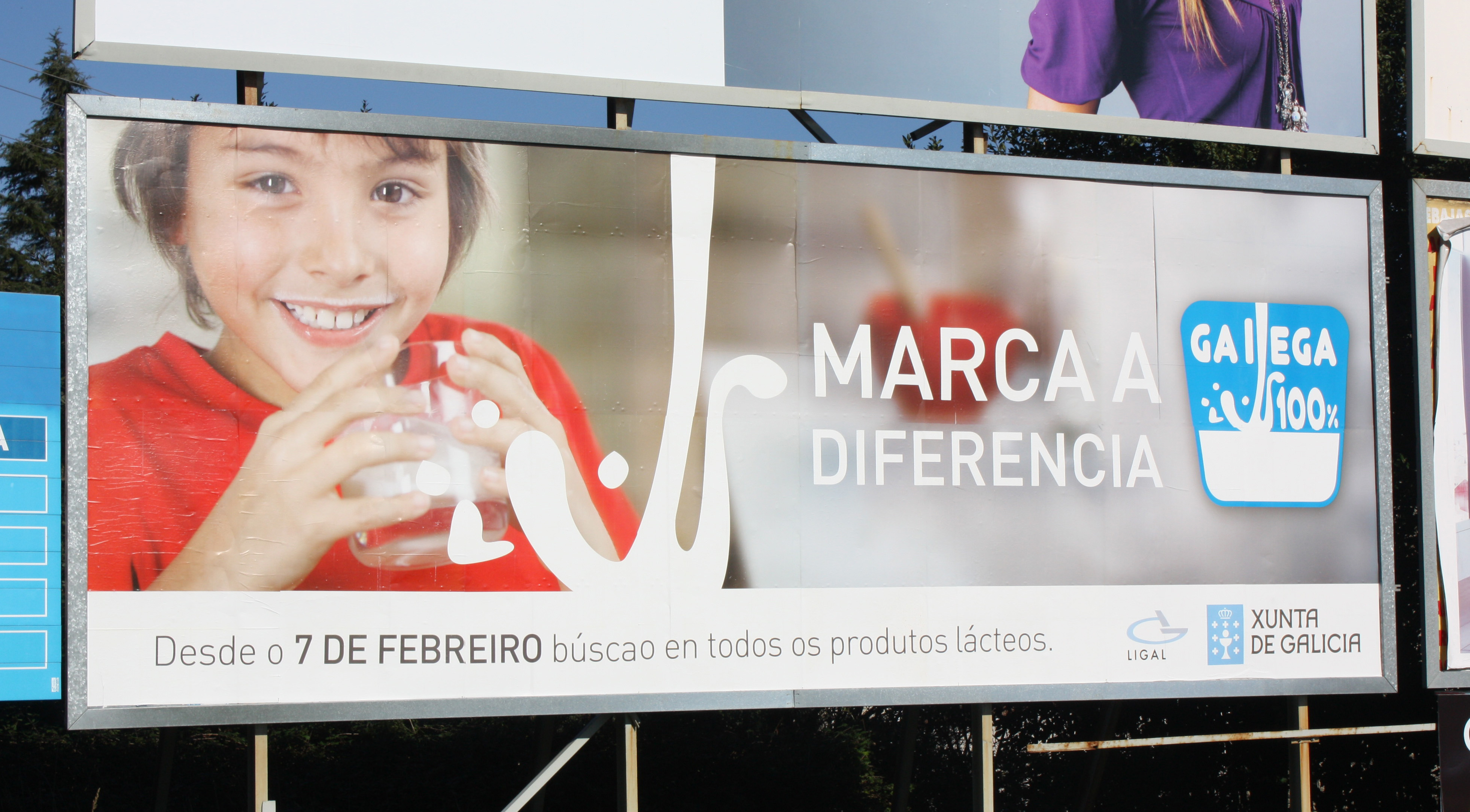 Panneau publicitaire annonçant le label "Galega 100%" pour le lait et les produits laitiers de Galice